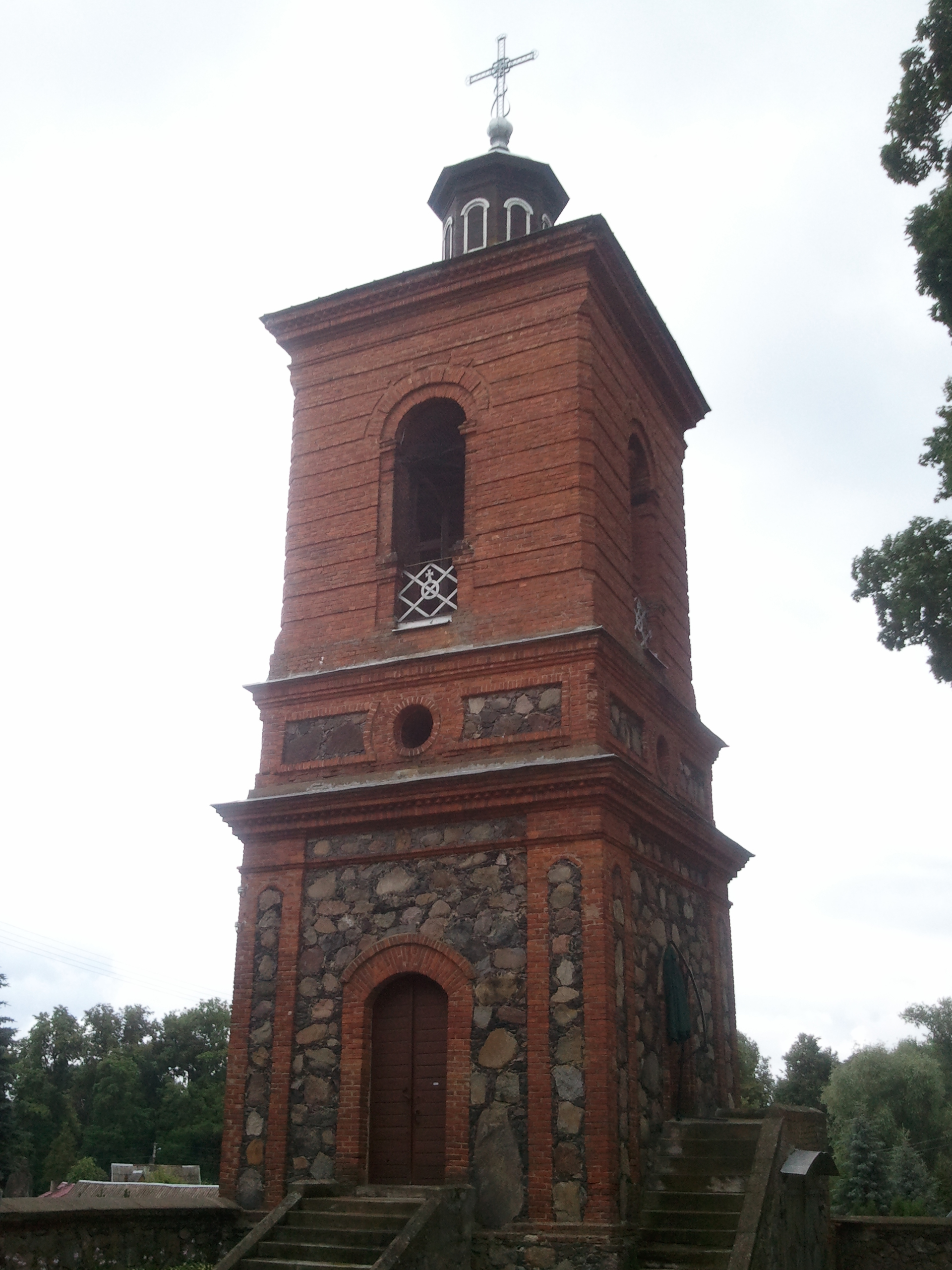 Utenos bažnyčios varpinė